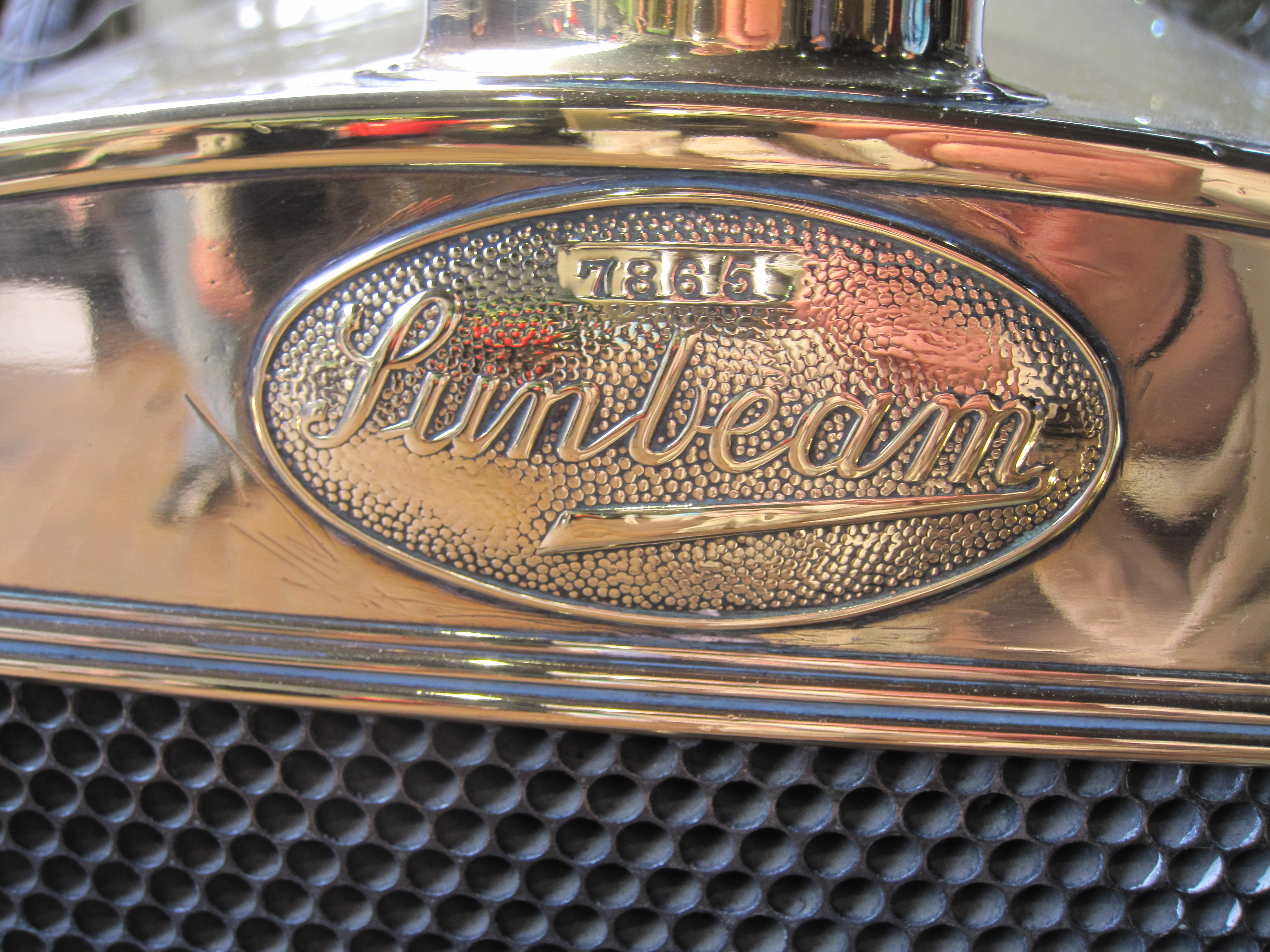 badge 1914 Sunbeam 12/16 HP